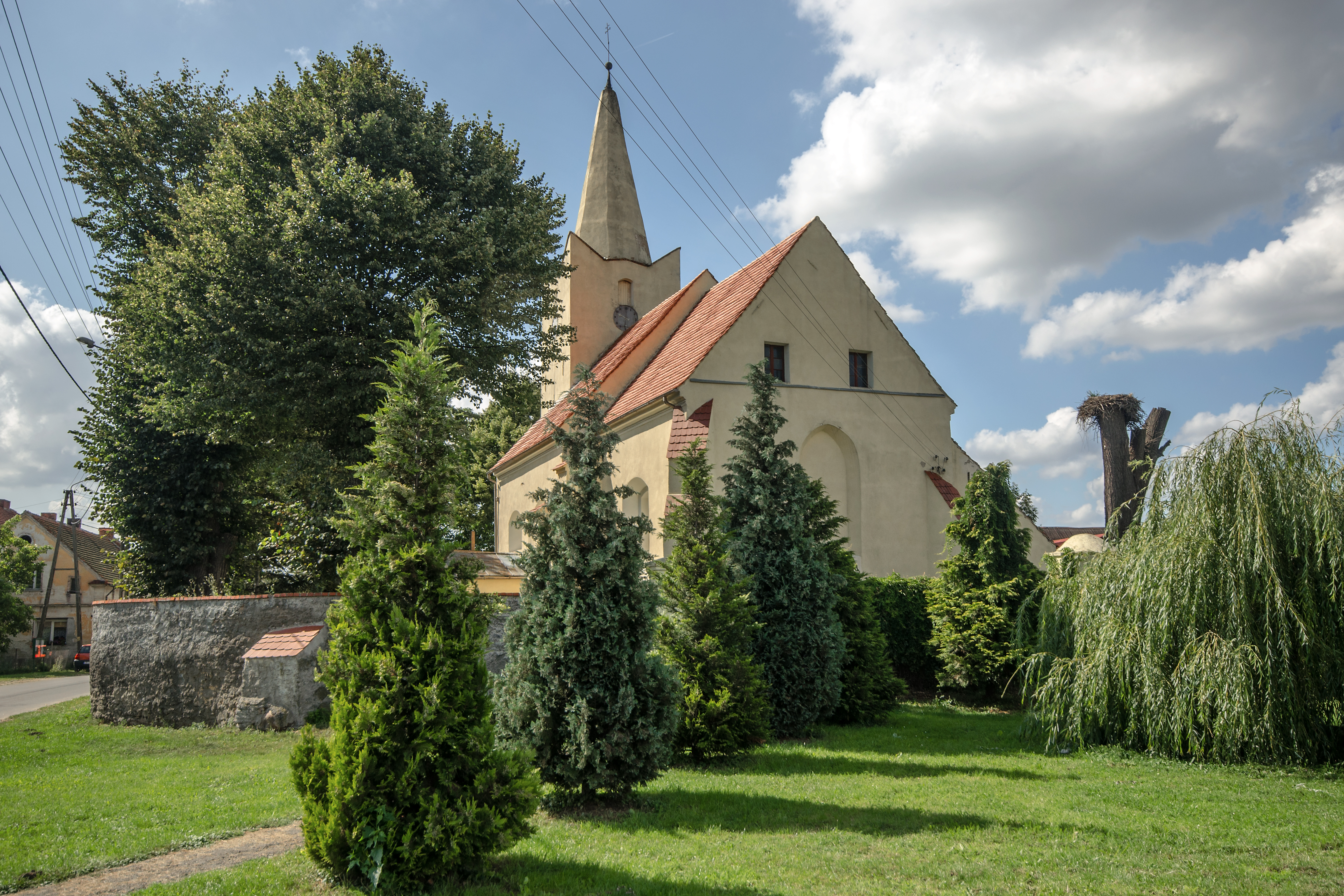 Przylesie Dolne, kościół fil. p.w. śś. Piotra i Pawła, 2 poł. XV, XIX/XX